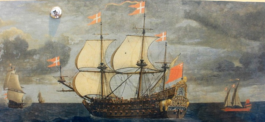 Die Frederic_III wurde um 1650 auf der Werft in Neustadt Holstein gebaut.